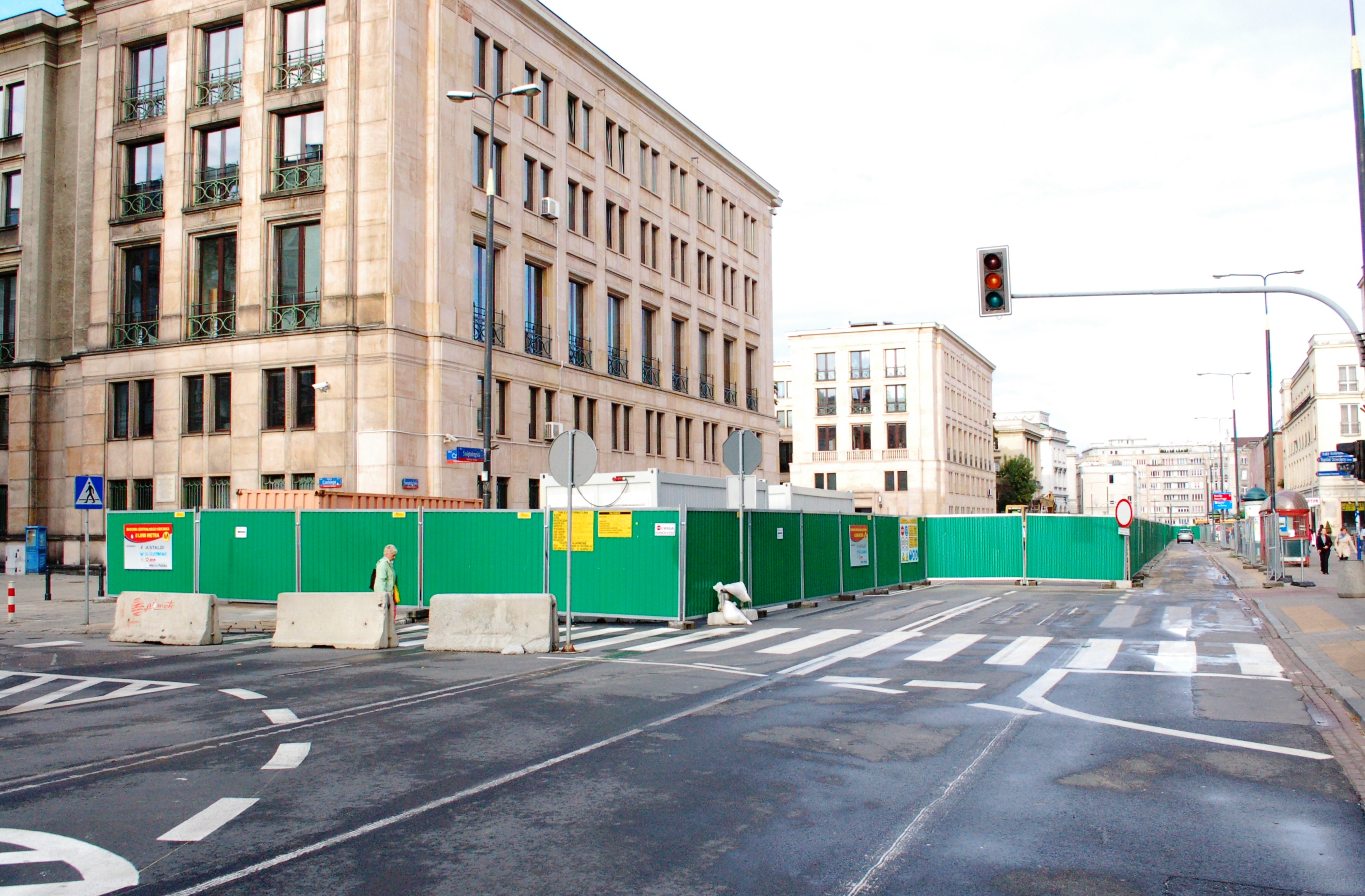 Warschau, new metro station (West-east line nr 2) under construction